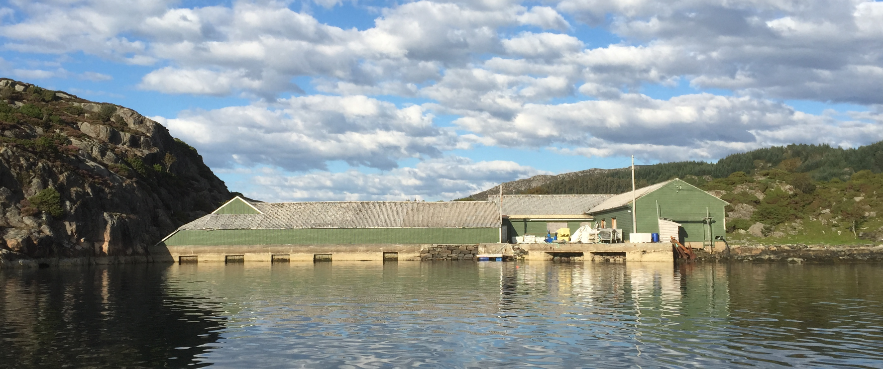 Hummerfarm i Austefjorden, Sund kommune